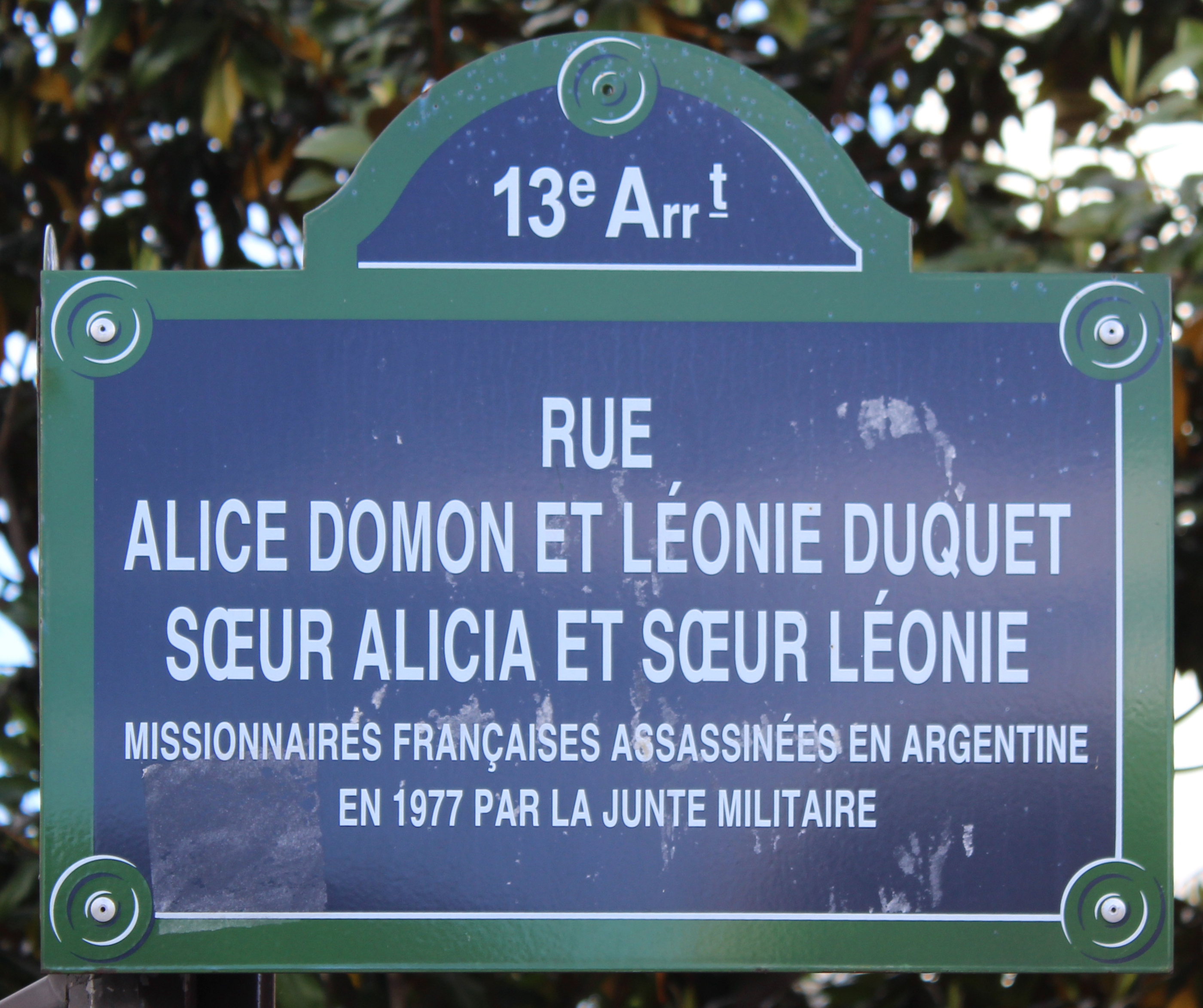 Place de la rue Alice-Domon-et-Léonie-Duquet, Paris.